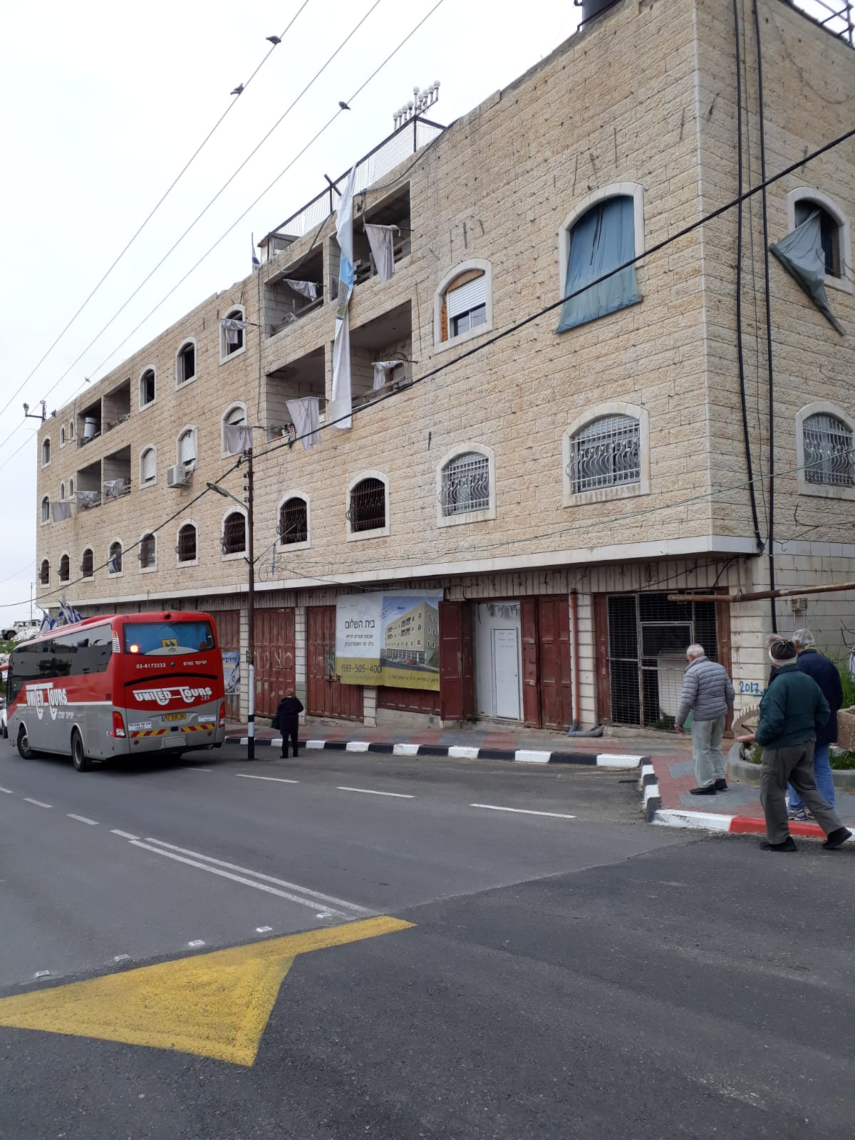 בית השלום, חברון - מרץ, 2019